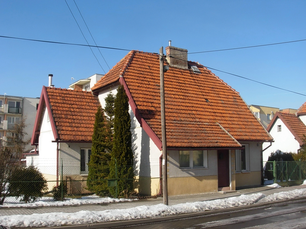 Zabudowa na osiedlu Górzyskowo w Bydgoszczy